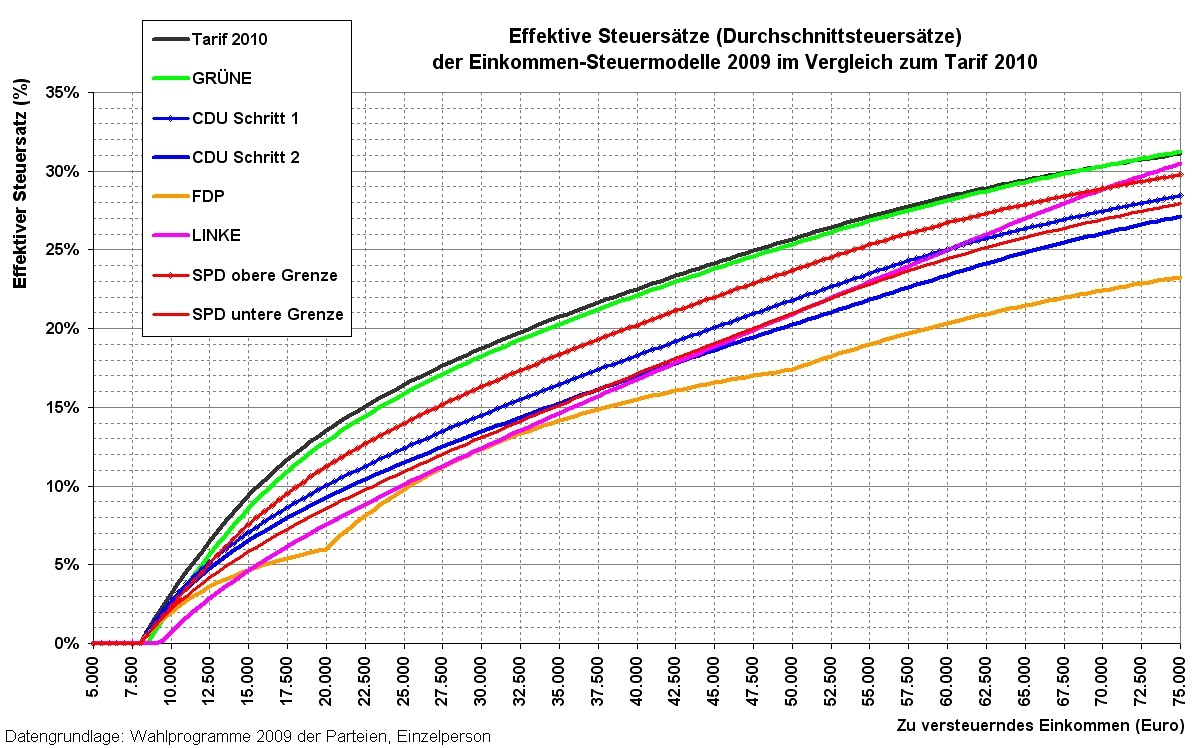 Vergleich der Steuermodelle zur Bundestagswahl 2009 hinsichtlich effektivem Steursatz.